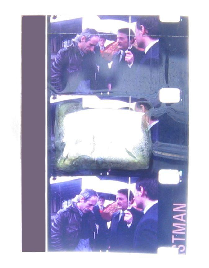 16-mm-Film, bei dem ein Filmbild infolge Blockieren des Filmtransportes durchgebrannt ist